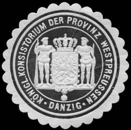 Sealing stamp Title: Königl. Konsistorium der Provinz Westpreussen - Danzig Description: schwarz, weiß, geprägt Place: Danzig size: 4 cm